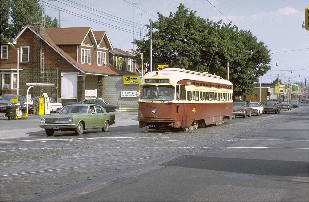 506 Carlton line